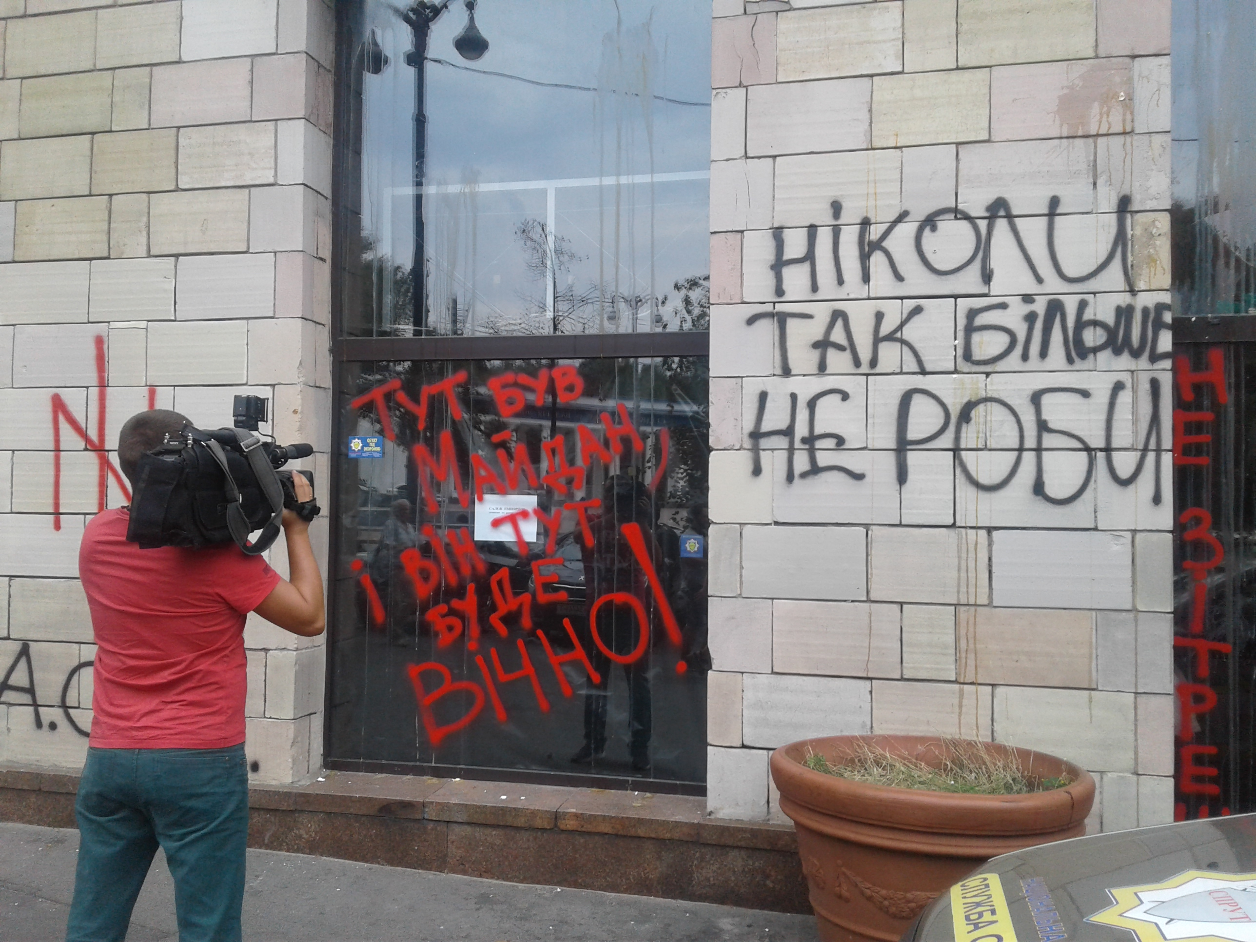 Наслідки протесту проти знищення графіті "Ікони Революції" (3.09.2017). Київ, вул. Грушевського, 4.